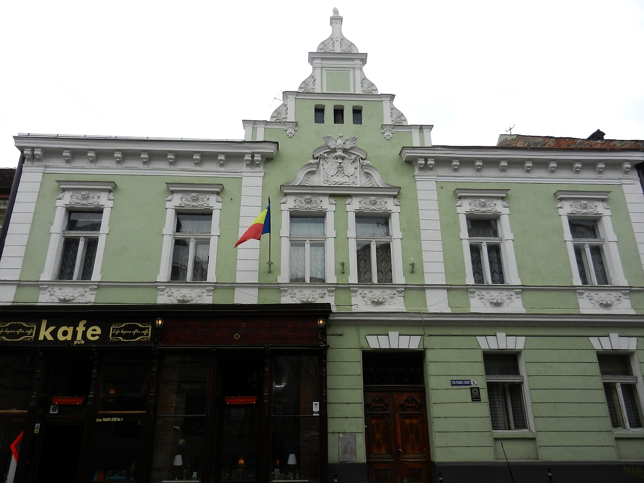 Casă monument istoric